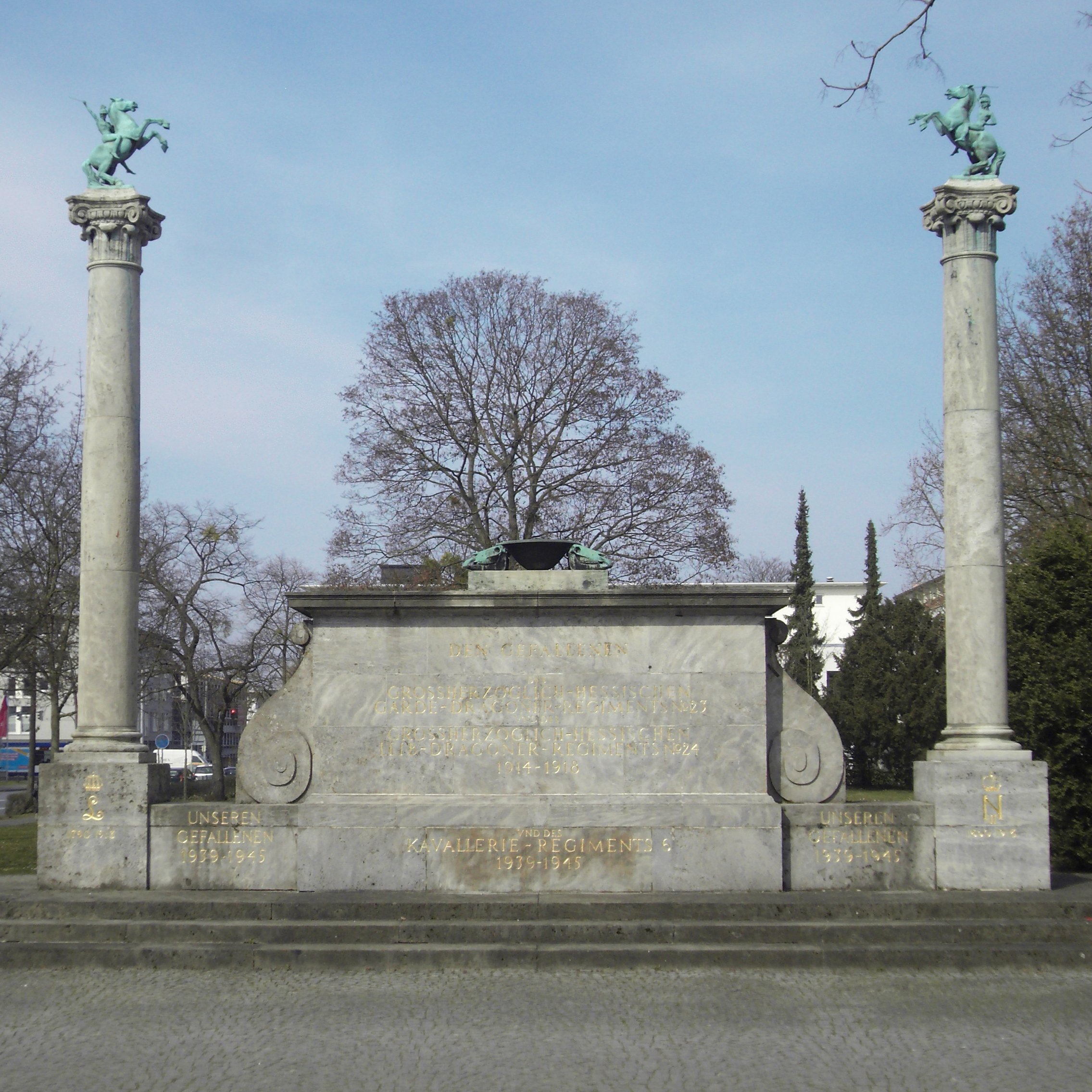 Denkmal Hessisches Kavallerieregiment Darmstadt Landgraf-Phillipps-Anlage